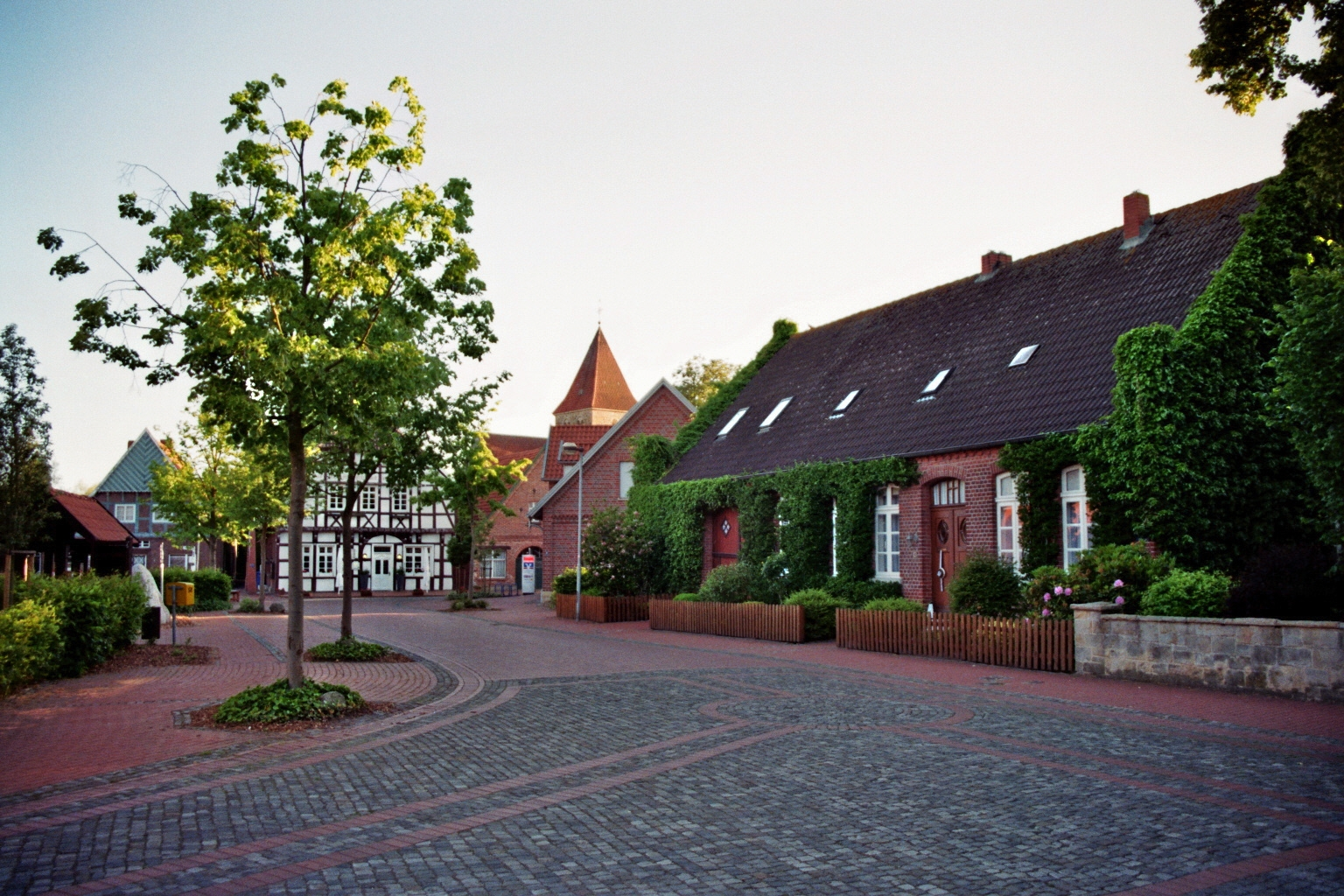 Ortskern von Hopsten-Schale, Kreis Steinfurt, Nordrhein-Westfalen.